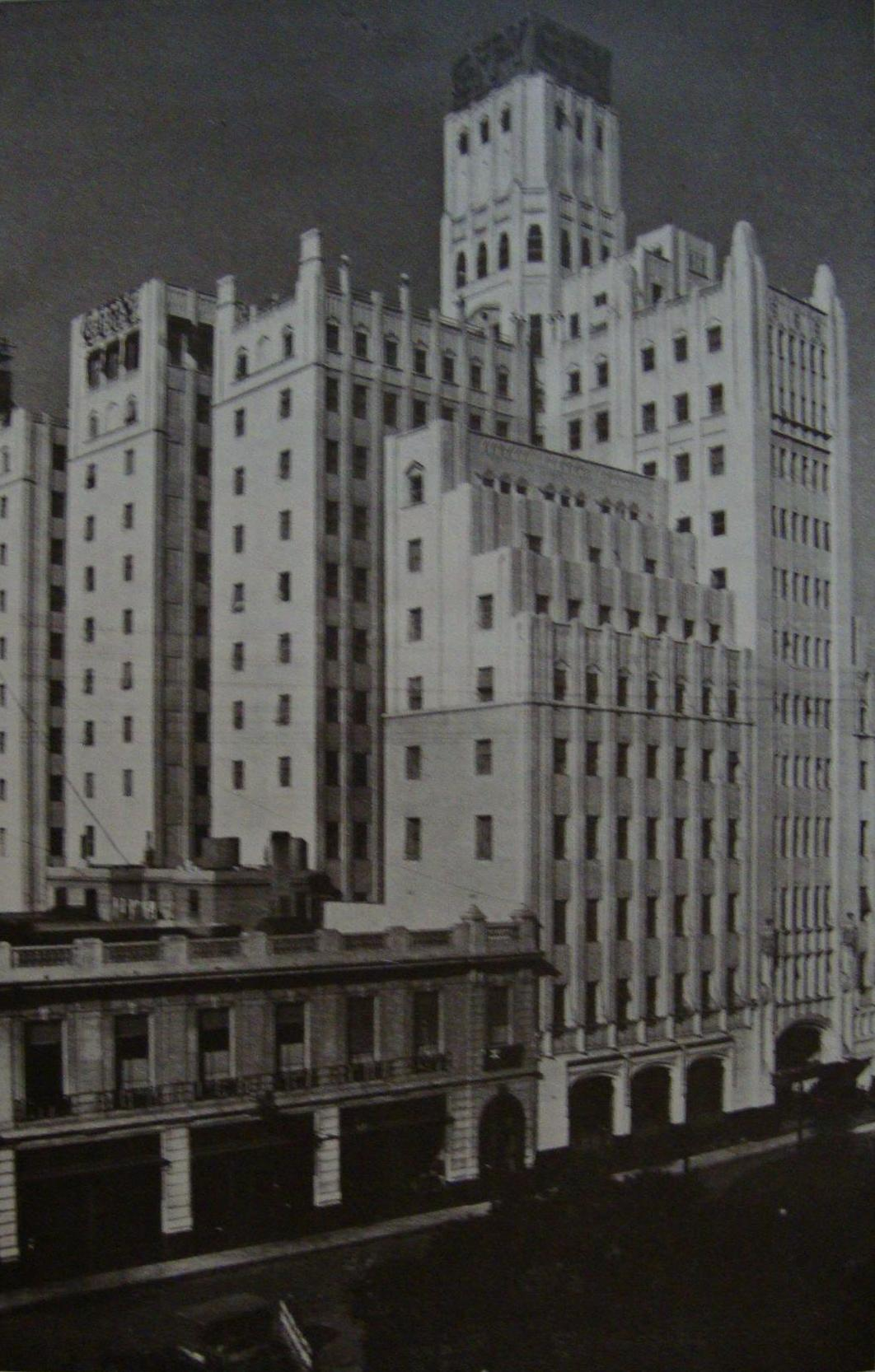 Vista del edificio del City Hotel recién inaugurado, en la calle Bolívar nº 160. Buenos Aires, Argentina.